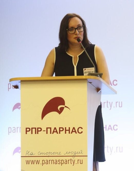 Наталья Пелевина